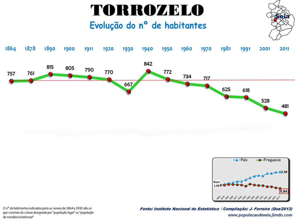 Evolução da População 1864 / 2011